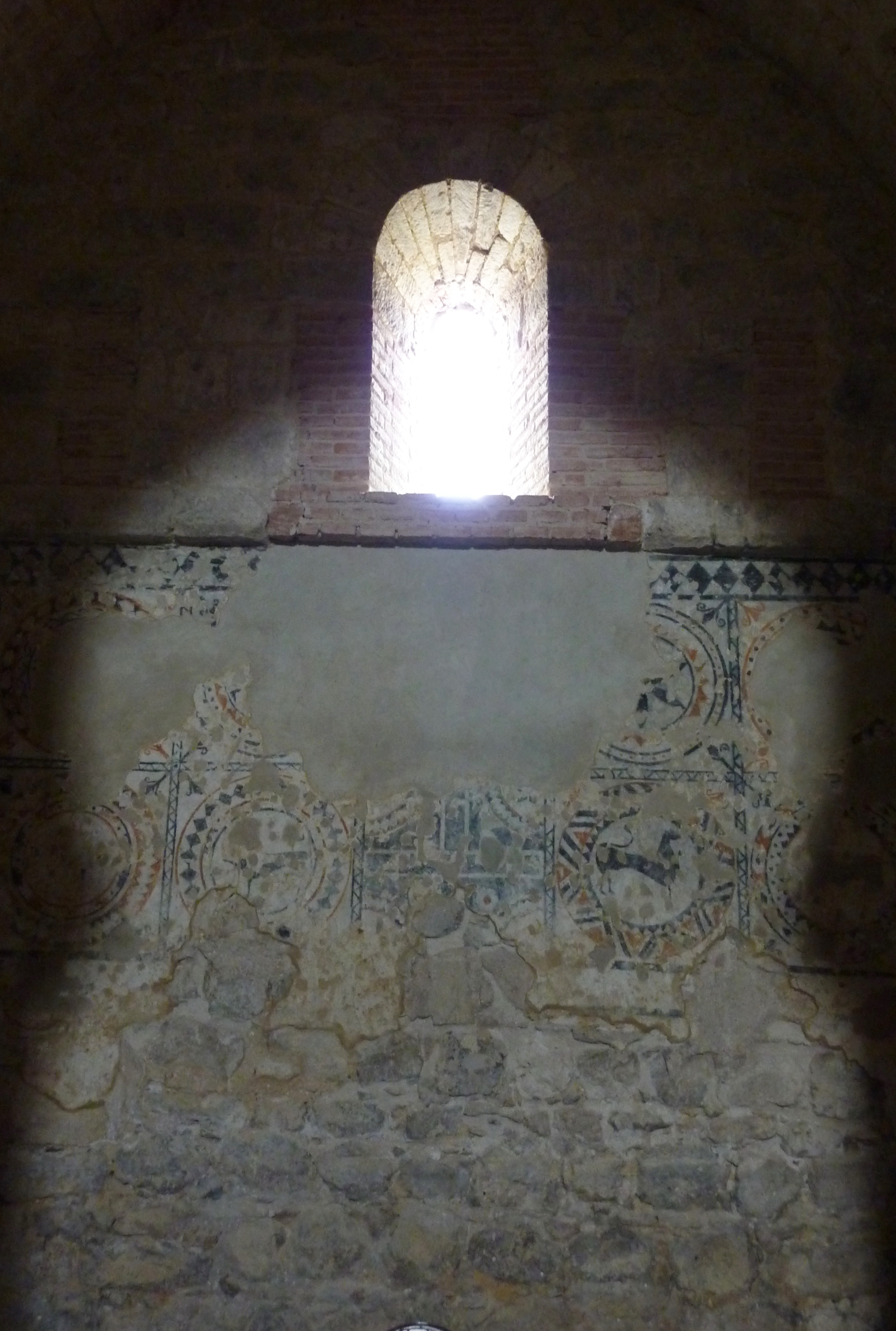 Katholische Kirche Santa María de Wamba in Wamba in der spanischen Provinz Valladolid (Castilla y León), Malerei an der Apsisstirnwand (romanisch oder mozarabisch ?)